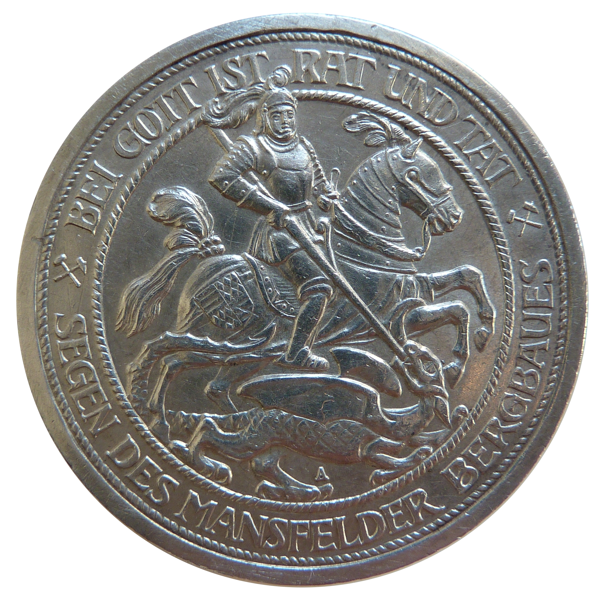 Vorderseite der 3-Mark-Münze Preußens zur Jahrhundertfeier der Zugehörigkeit der Grafschaft Mansfeld zu Preußen